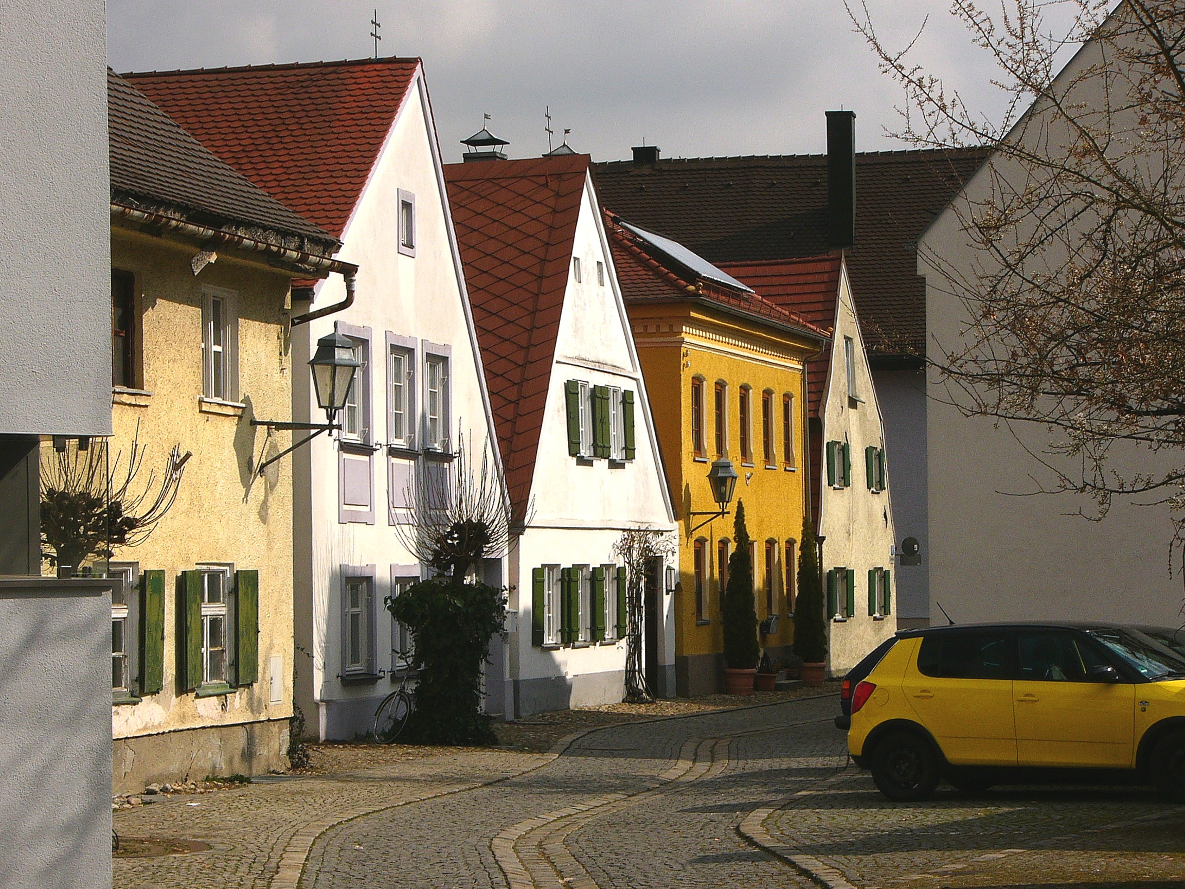 Ensemble Botengasse; geschlossene Reihe ein- und zweigeschossiger kleiner Wohnhäuser in gepflastertem Gässchen. Es handelt sich um Putzbauten, die sich besonders durch die Vielfalt ihrer Dachformen (Mansard-, Flachwalm-, Frack-, giebel- und traufständiges Satteldach) auszeichnen. Die Häuser, in ihrer äußeren Erscheinung 1. Hälfte 19. Jahrhundert, stammen im Kern zum Teil aus dem 17./18. Jahrhundert. This is a photograph of an architectural monument.